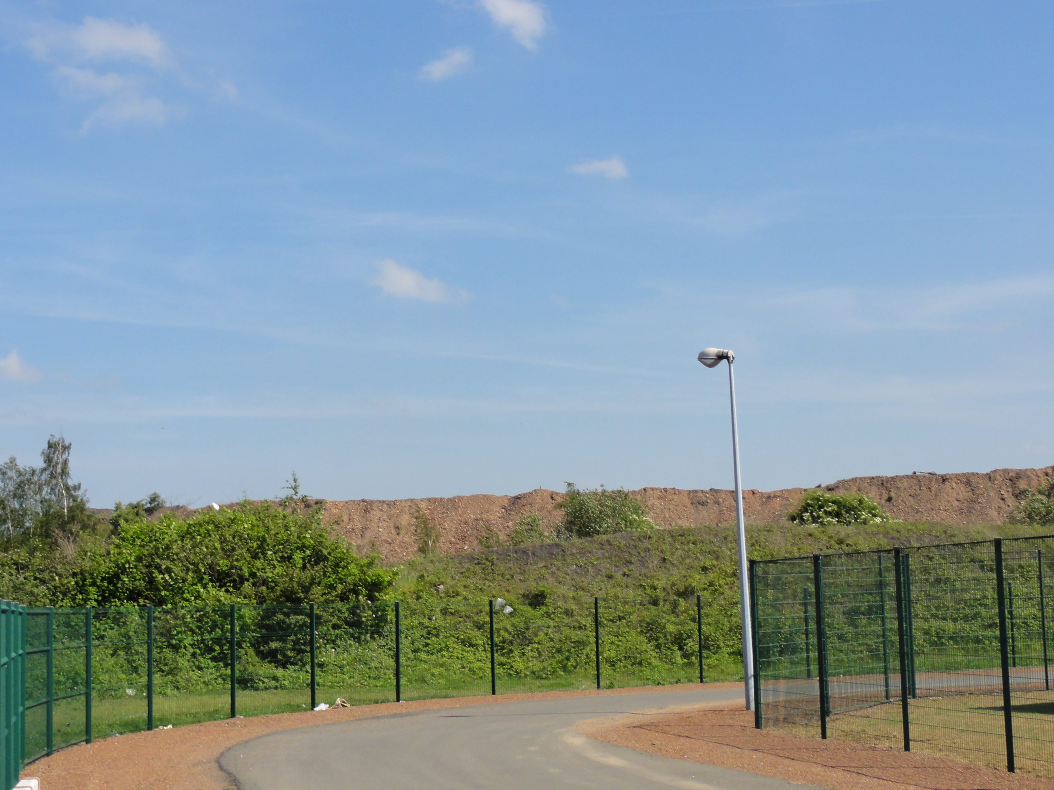 Terril n° 76 dit 7 de Liévin, fosse n° 7 - 7 bis de la Compagnie des mines de Liévin dans le bassin minier du Nord-Pas-de-Calais, Avion, Pas-de-Calais, Nord-Pas-de-Calais, France.